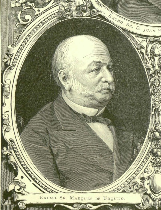 Excmo, Sr. Marqués de Urquijo